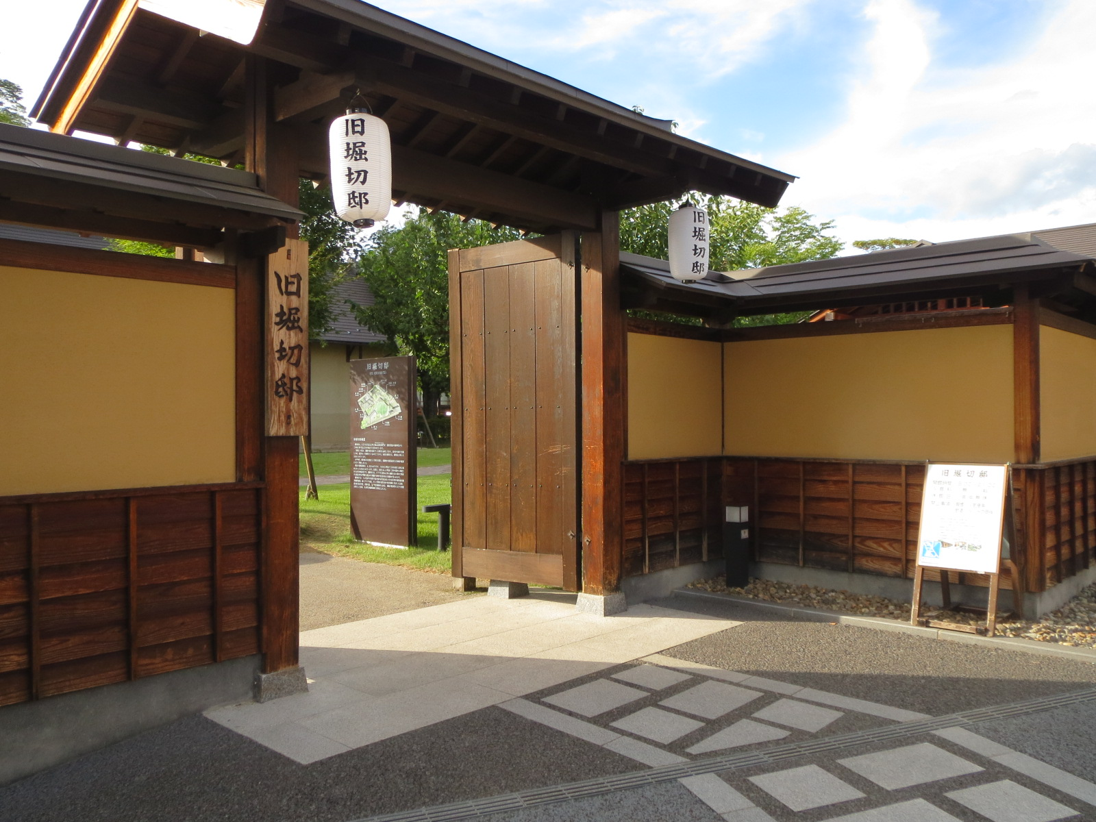 福島市にある旧堀切邸正門